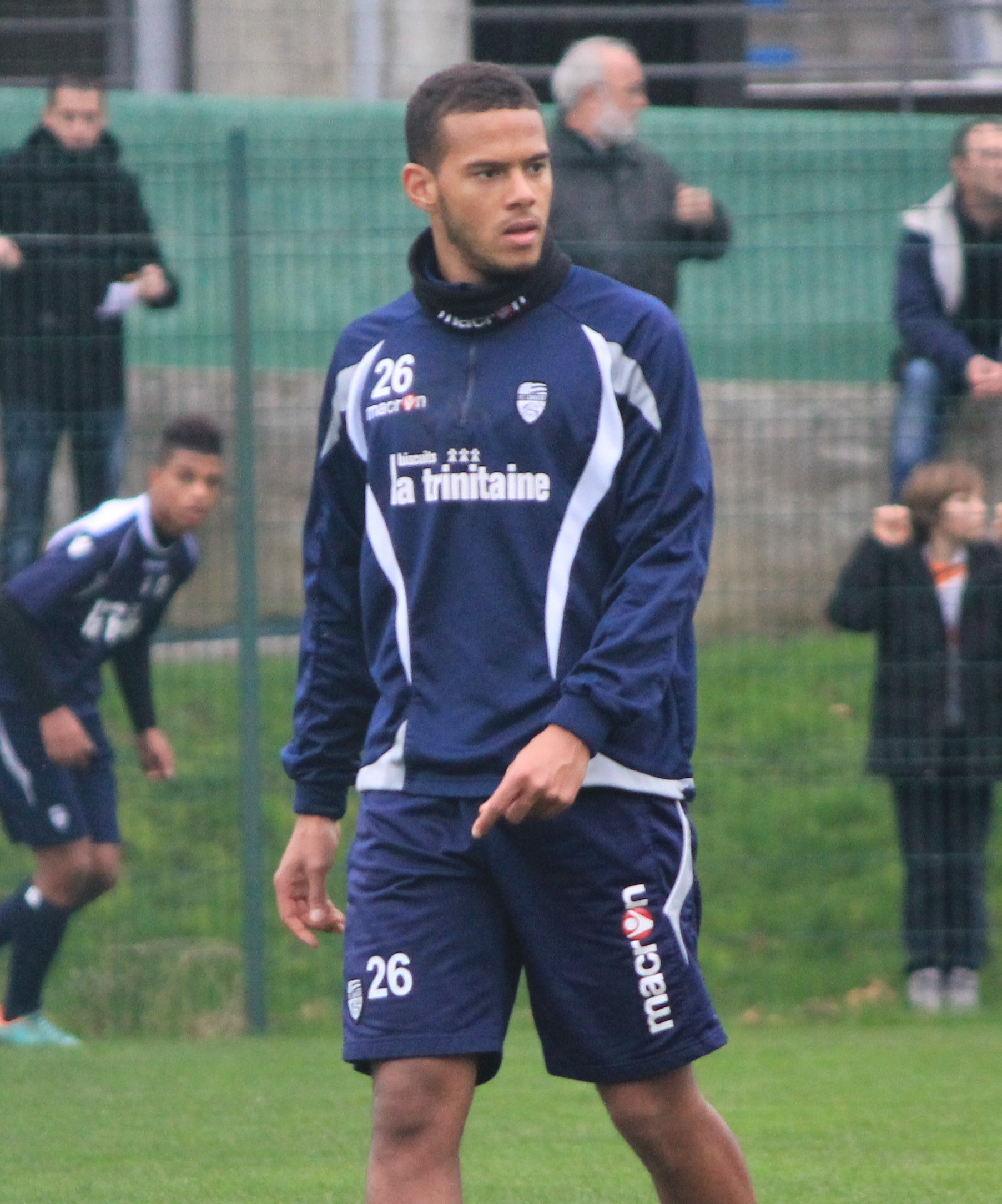 Rémi Mulumba pendant un entrainement du FC Lorient le 3 janvier 2012